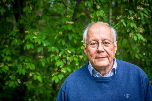 Foto av Torbjörn Åkerstedt